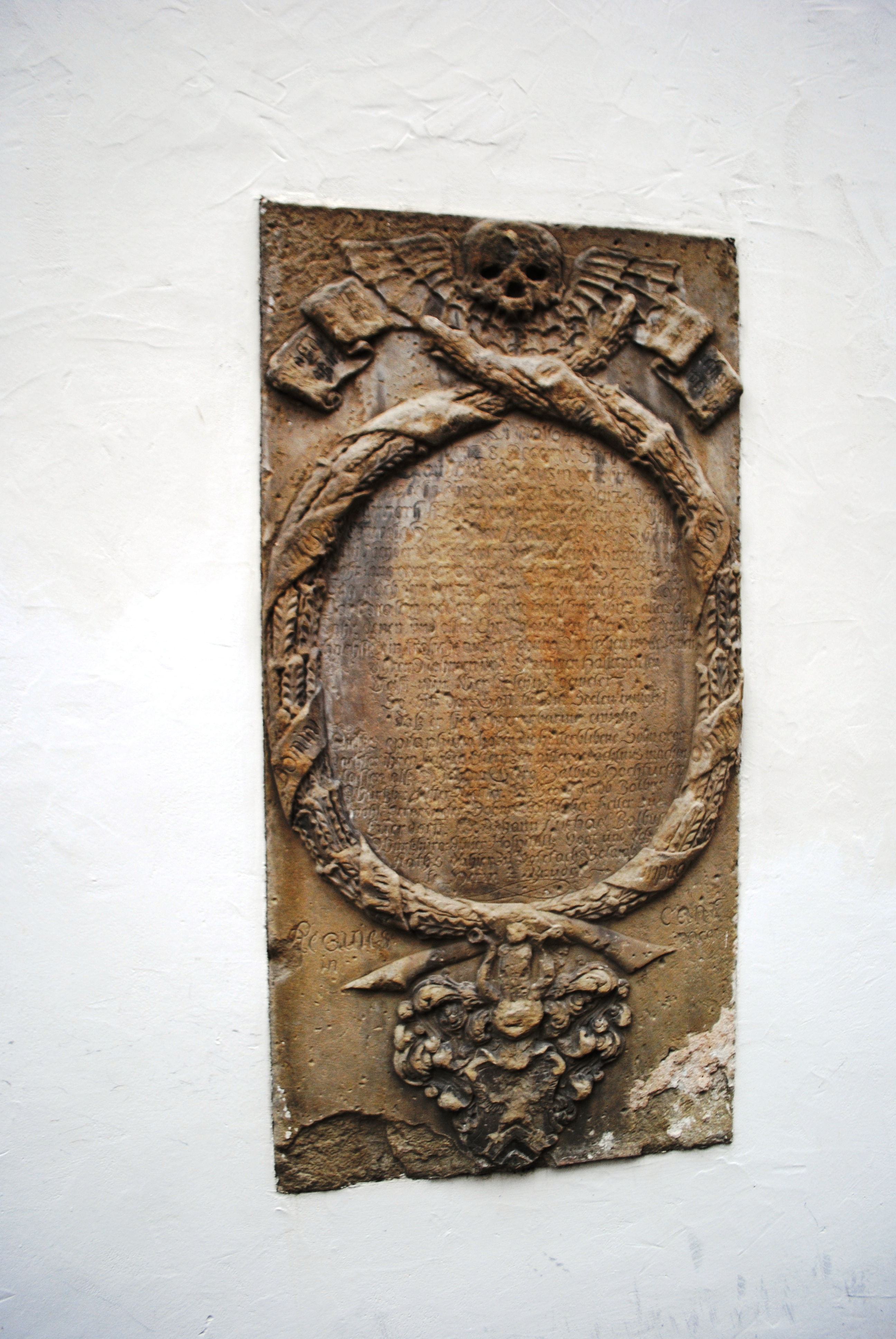 Epitaph, Hauptstraße 9, Volkach, im Lorbeerkranz mit Familienwappen, Sandsteinplatte, 17. Jahrhundert; D-6-75-174-37